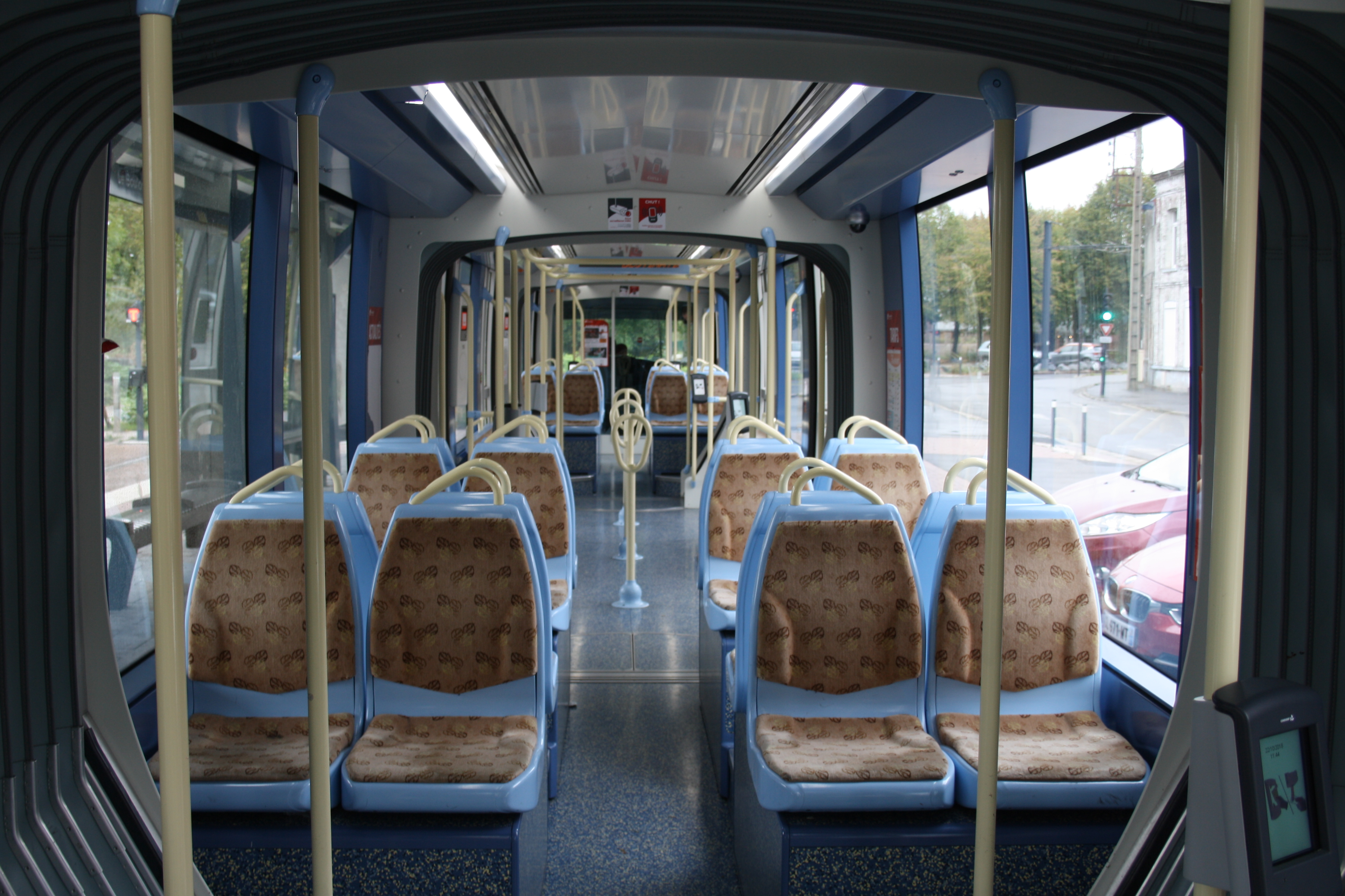 Innenansicht eines Triebwagens der Straßenbahn Valenciennes